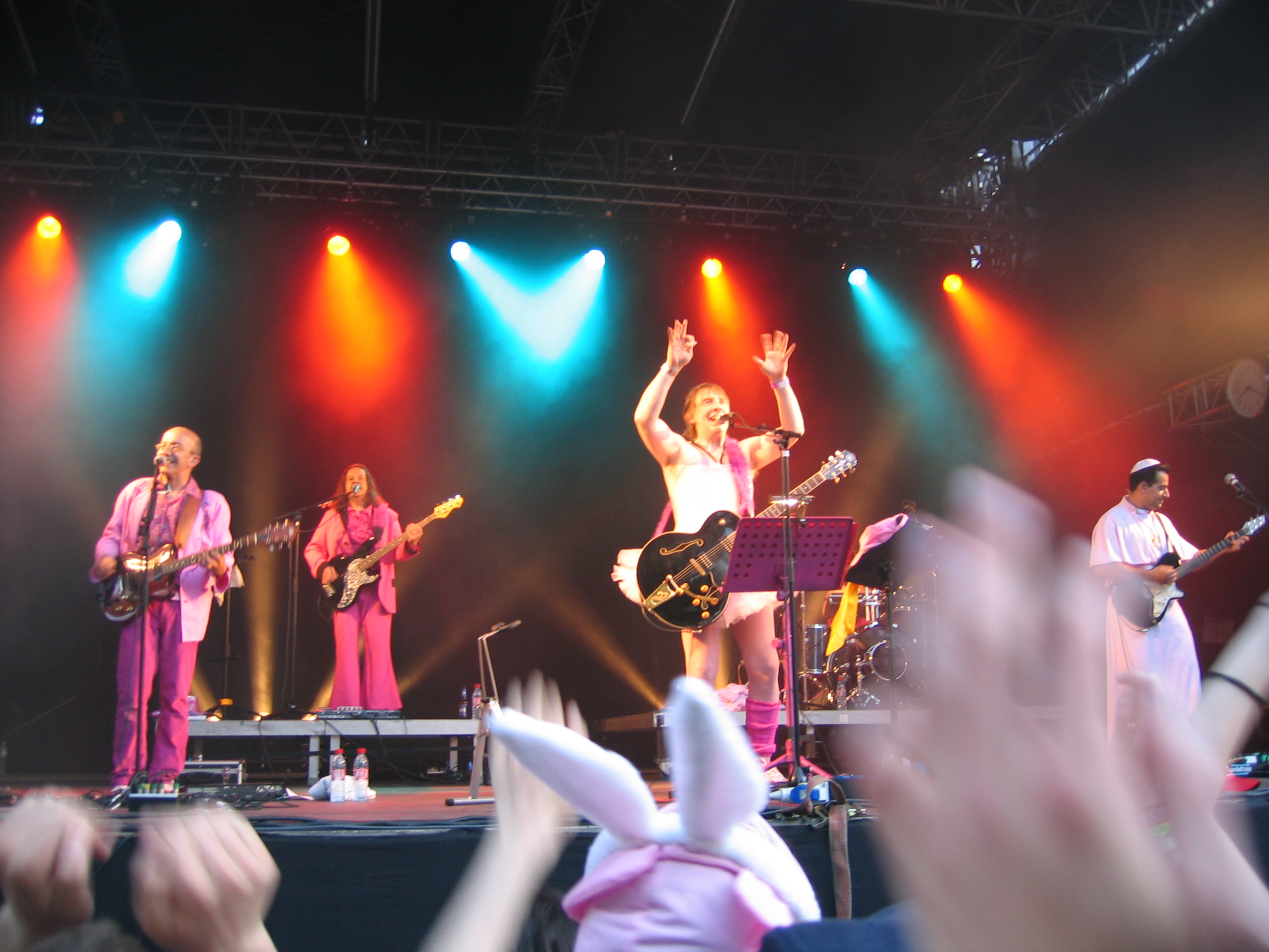 Sttellla, concert du 1er mai 2007 à Bruxelles, place du nouveau marché aux grains.